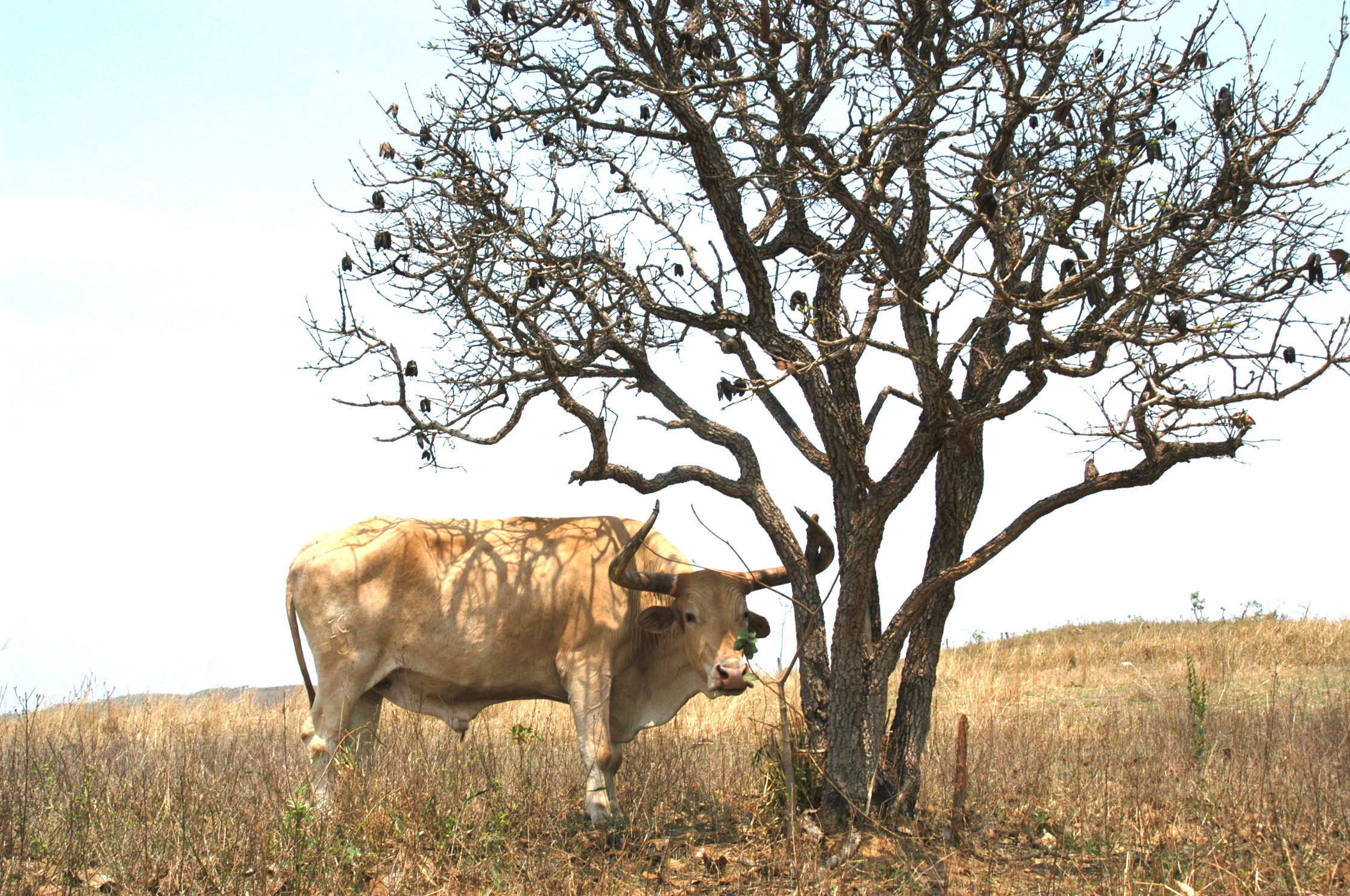 Boi caracu pastando